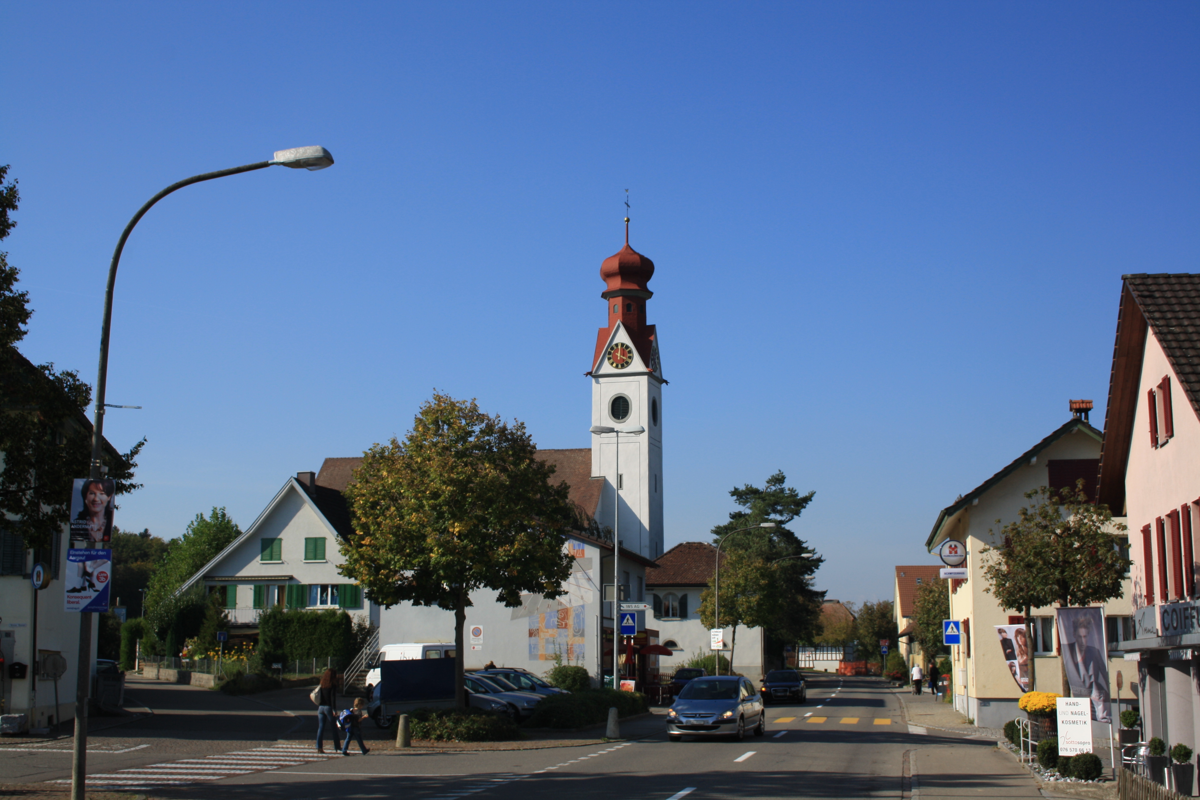 Niederwil